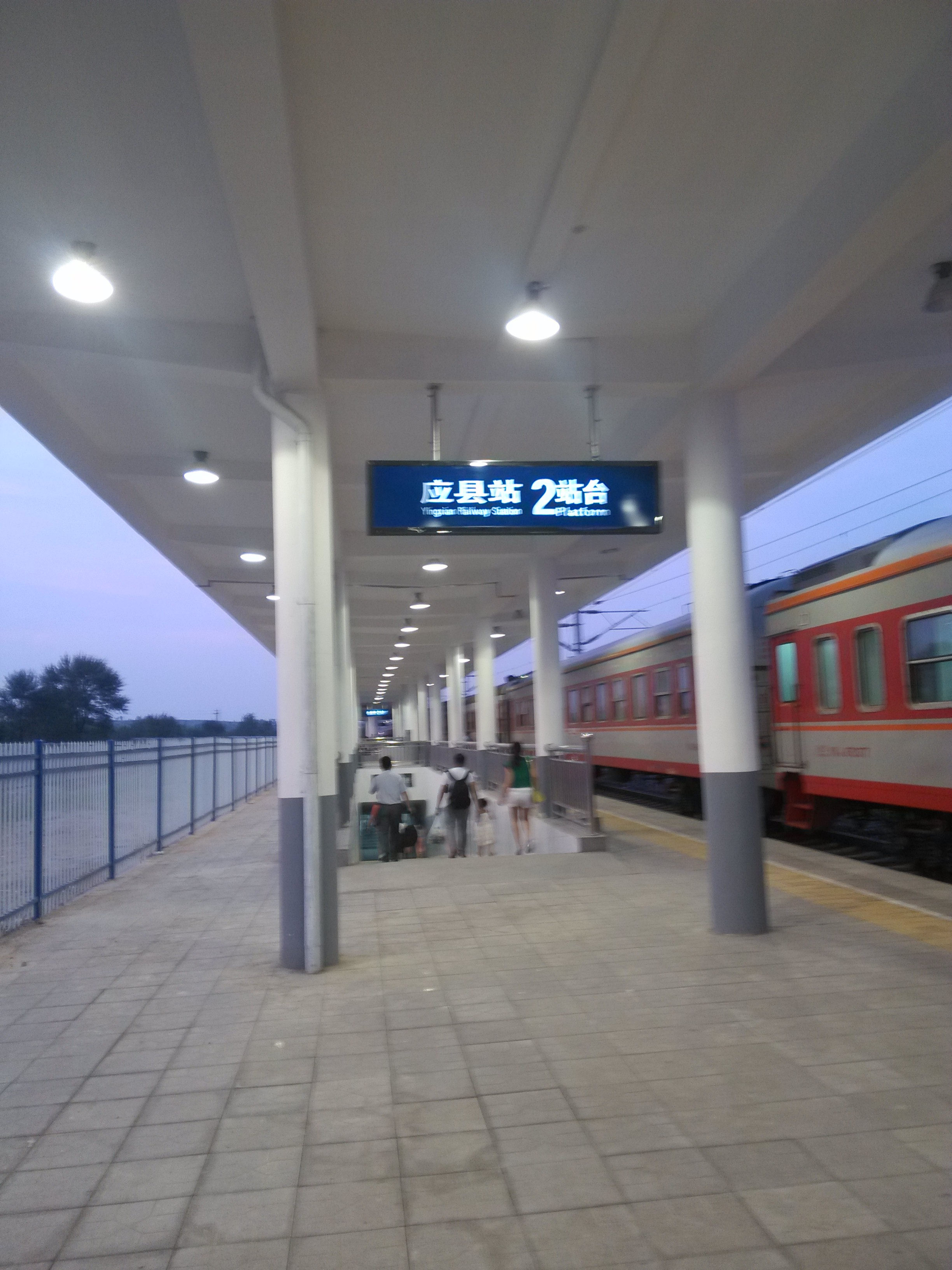 应县站站台。摄于山西省朔州市应县臧寨乡马庄村。